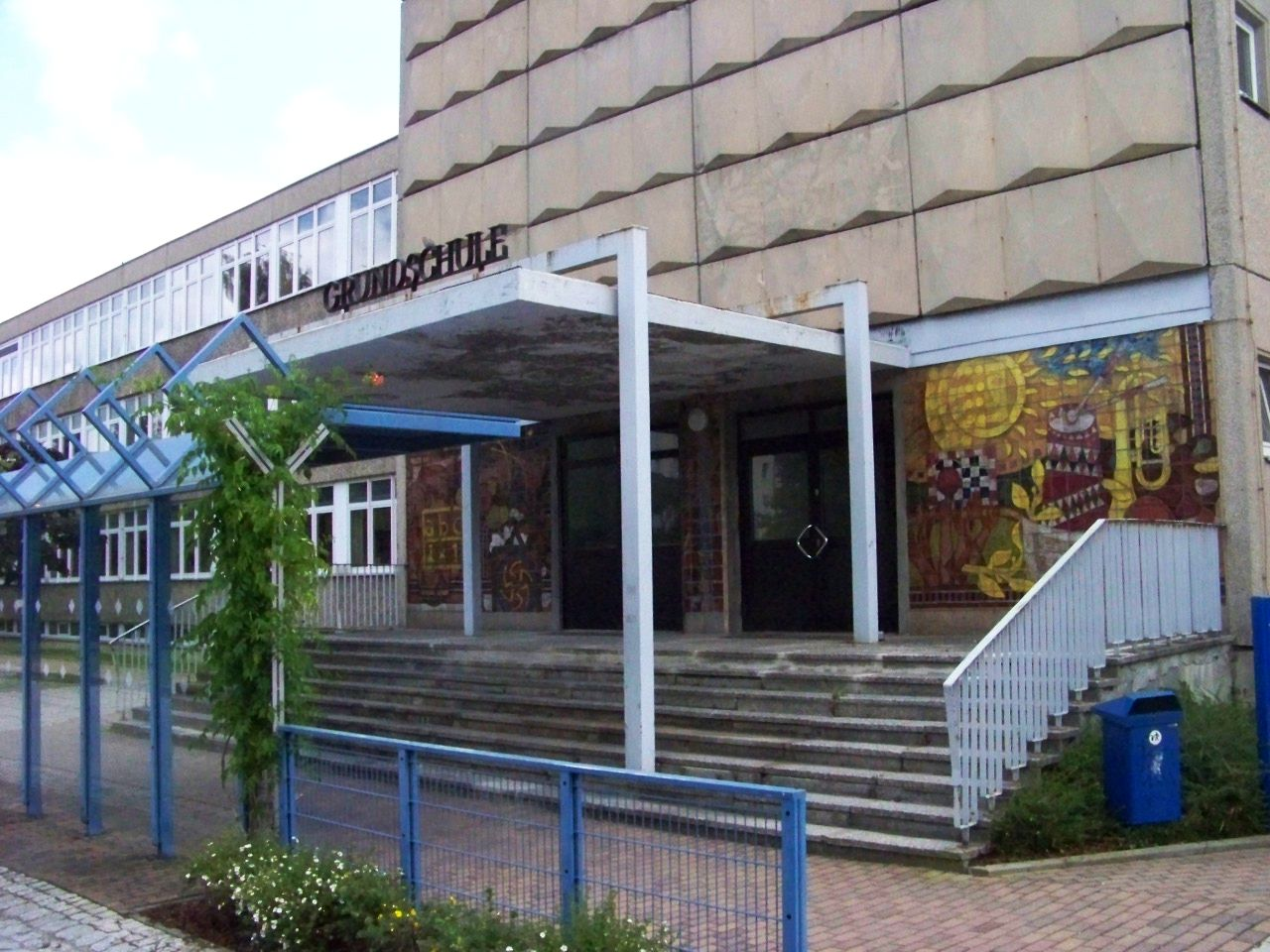 Schule in Neukieritzsch